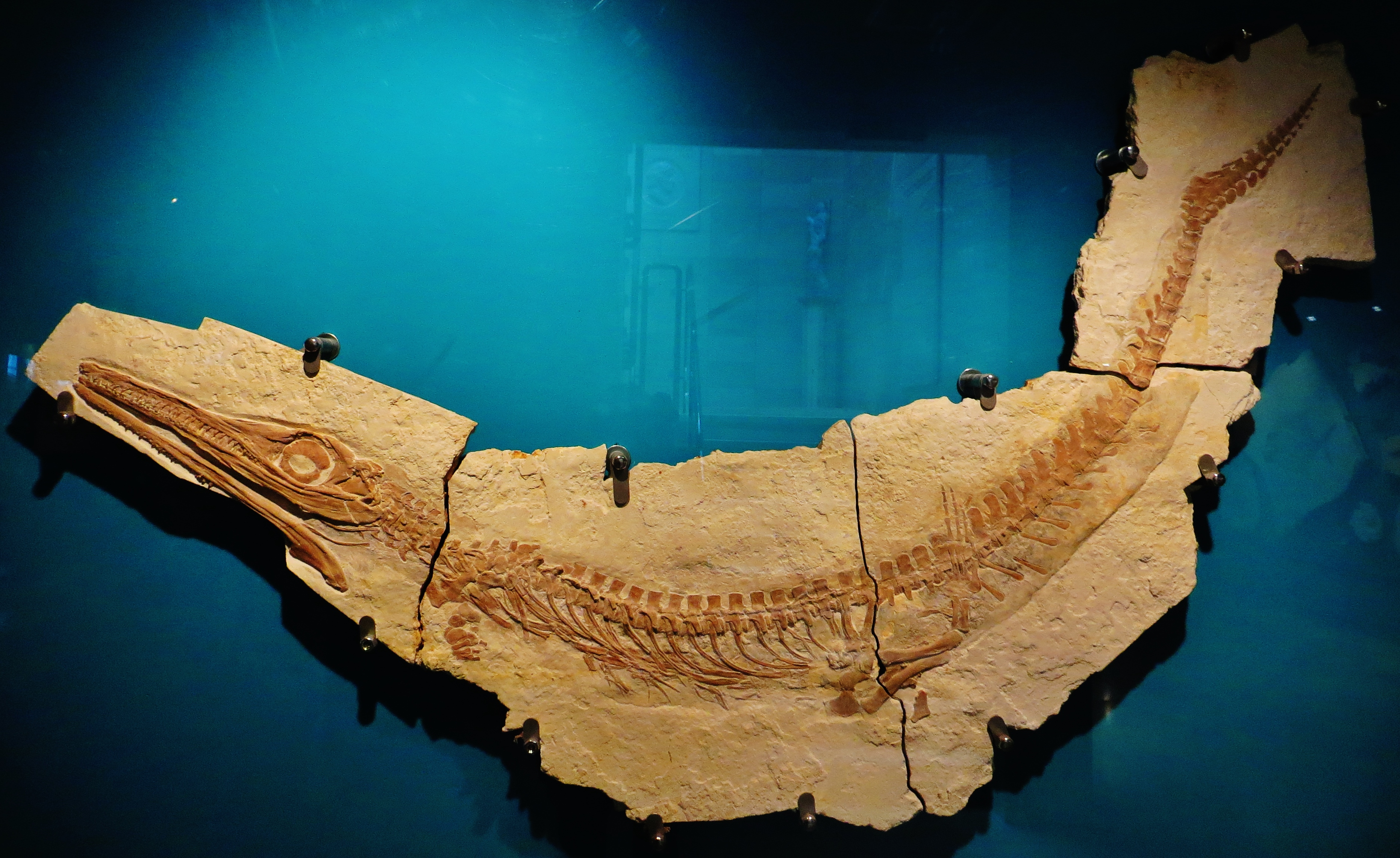 Took the picture at Burgmeister Muller Museum, Solnhofen